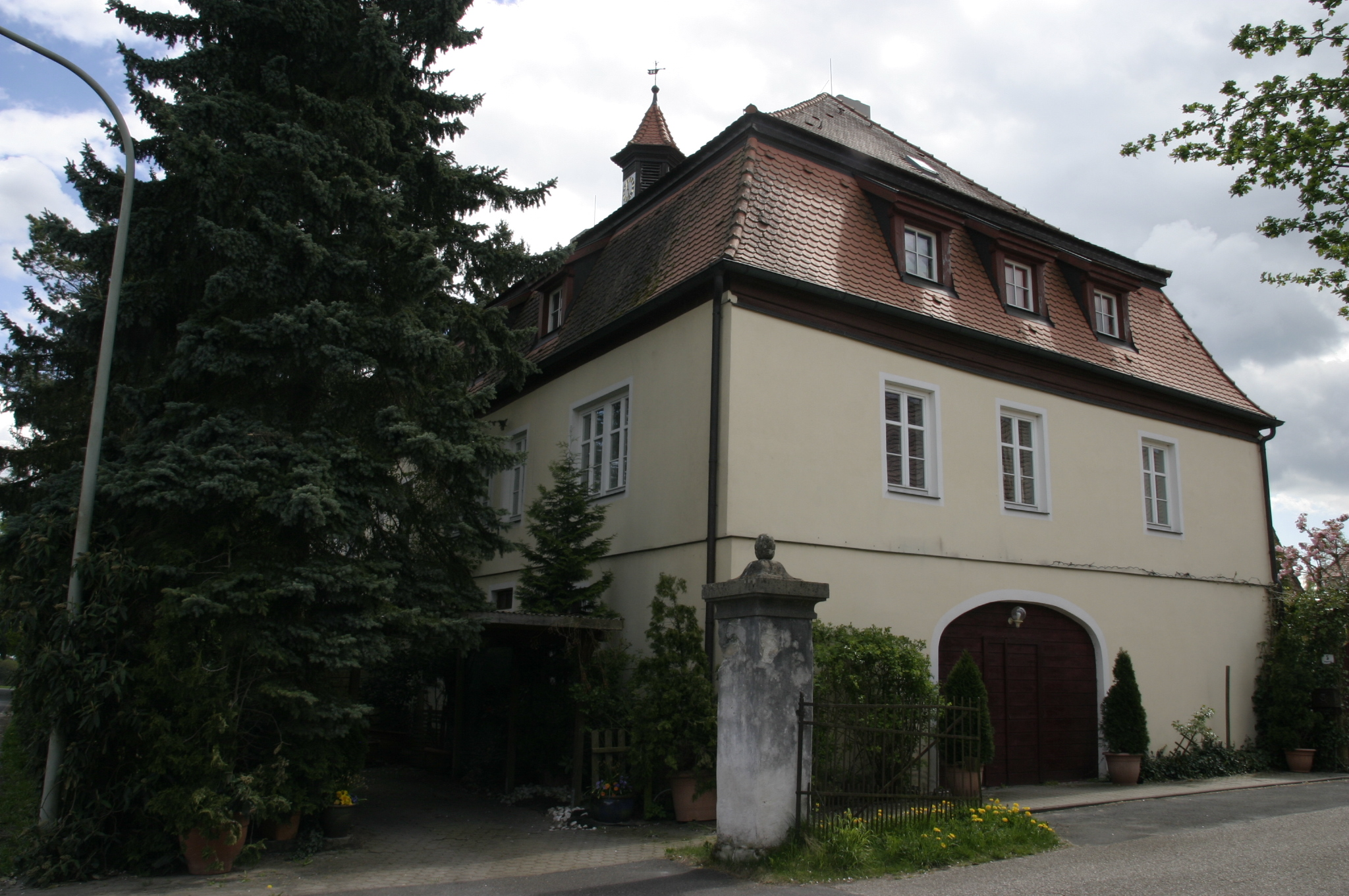 Ehemaliges Voghtshaus, sog. Altes Schloß, zweigeschossiger Mansarddachbau mit Dachreiter, 17. Jhdt. Bayerische Denkmalliste D-5-75-117-17